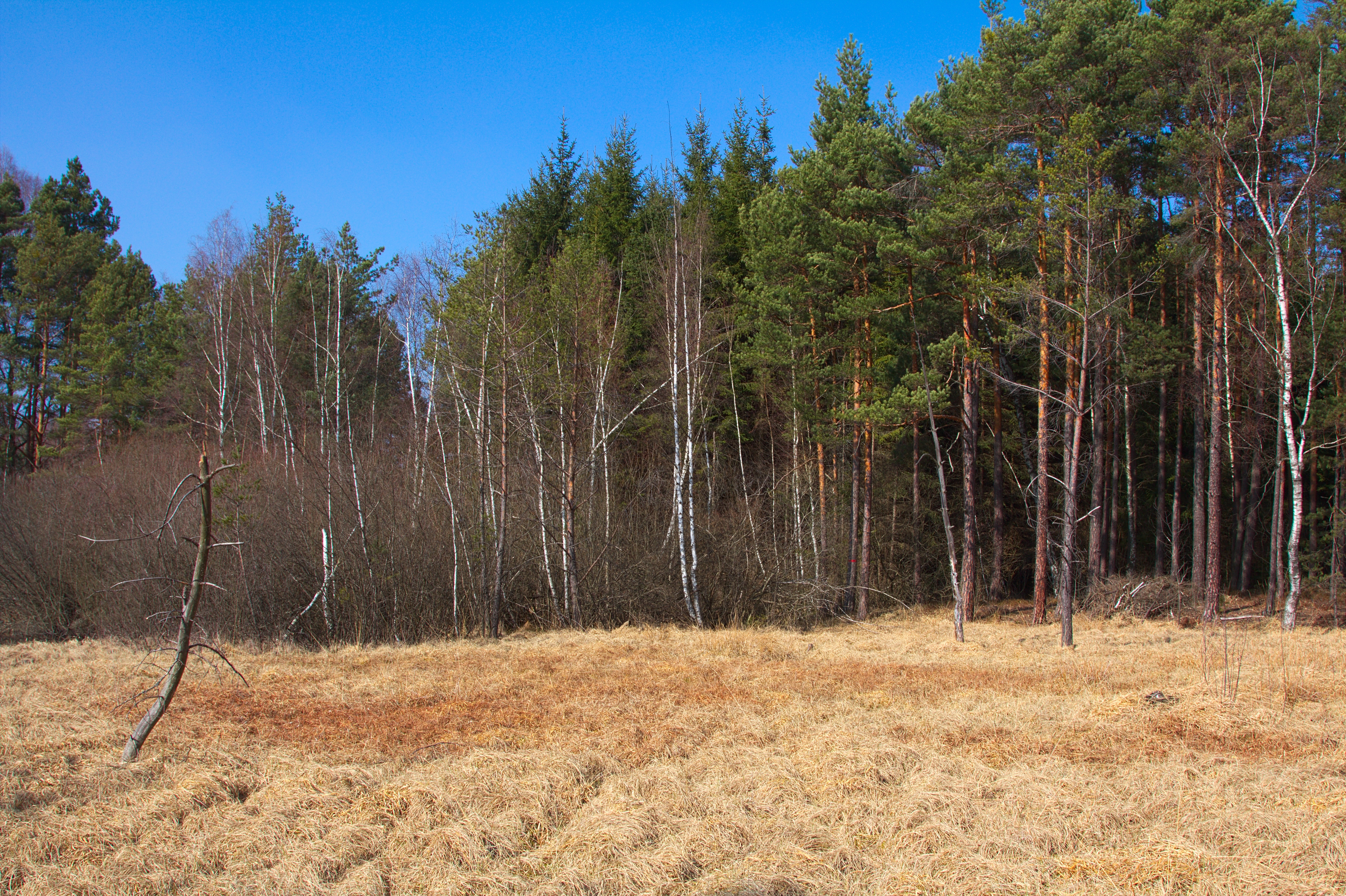 PP Žemlička - rašeliniětě